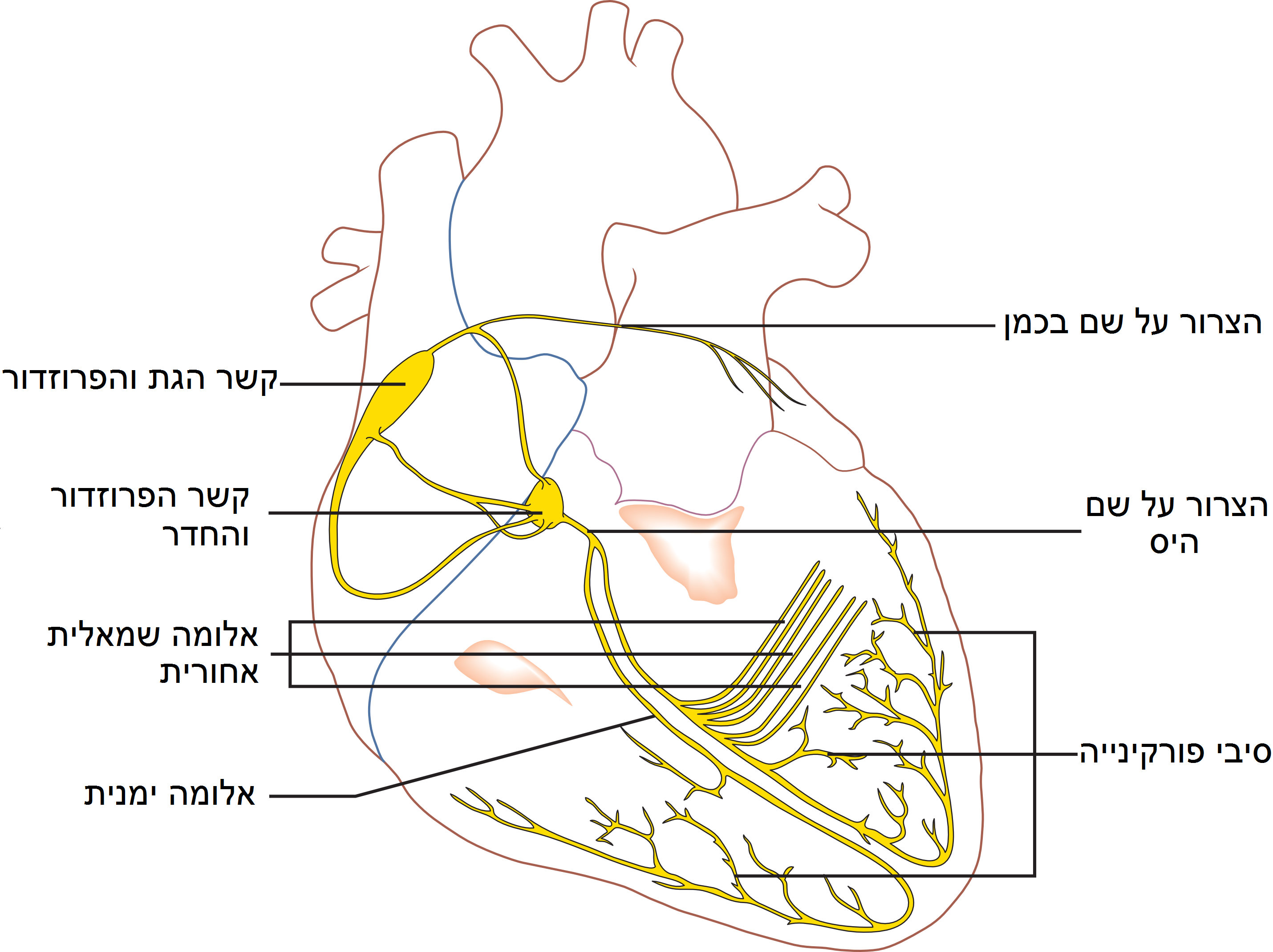 מערכת ההולכה החשמלית של הלב